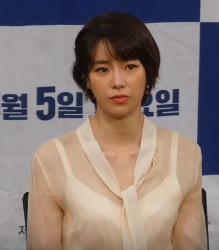 5일 오후 서울시 마포구 상암동 MBC에서 MBC 새 월화드라마 '웰컴2라이프' 제작발표회가 열렸다.